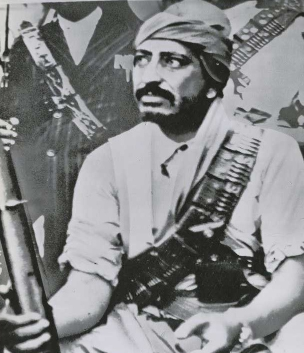 الامير محمد البدر 31 اكتوبر 1963م بعد الاطاحه بالمملكة المتوكلية